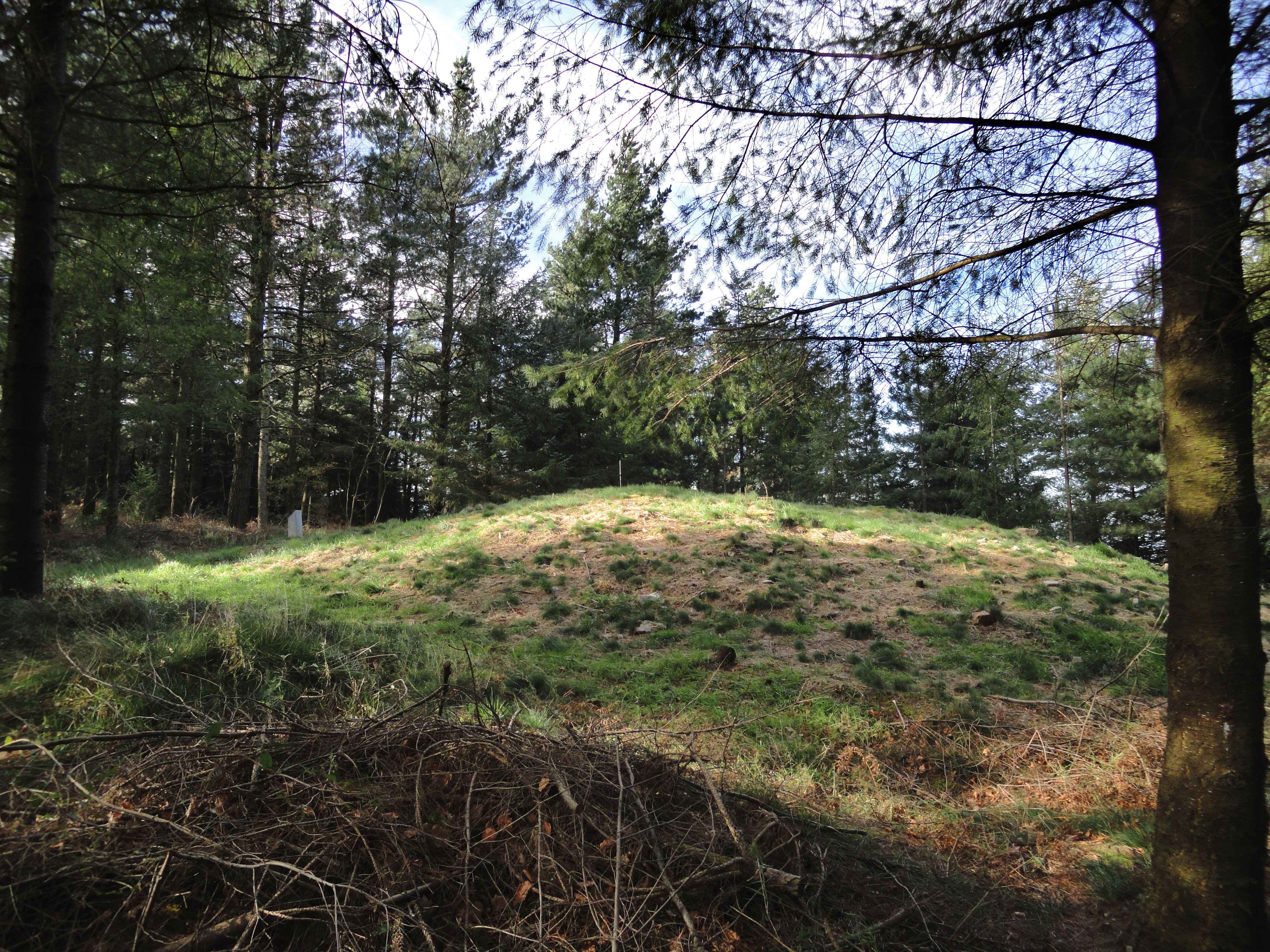 Tranpaluarri tumulua